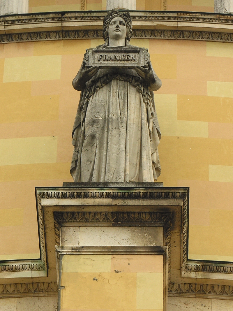 Diese Statue an der Aussenseite der Befreiungshalle in Kelheim steht für den Volksstamm der Franken, Höhe der Statue 580 cm. Sie ist eine von 18 Statuen, die nach Modellen des Bildhauers Johann Halbig geschaffen wurden.